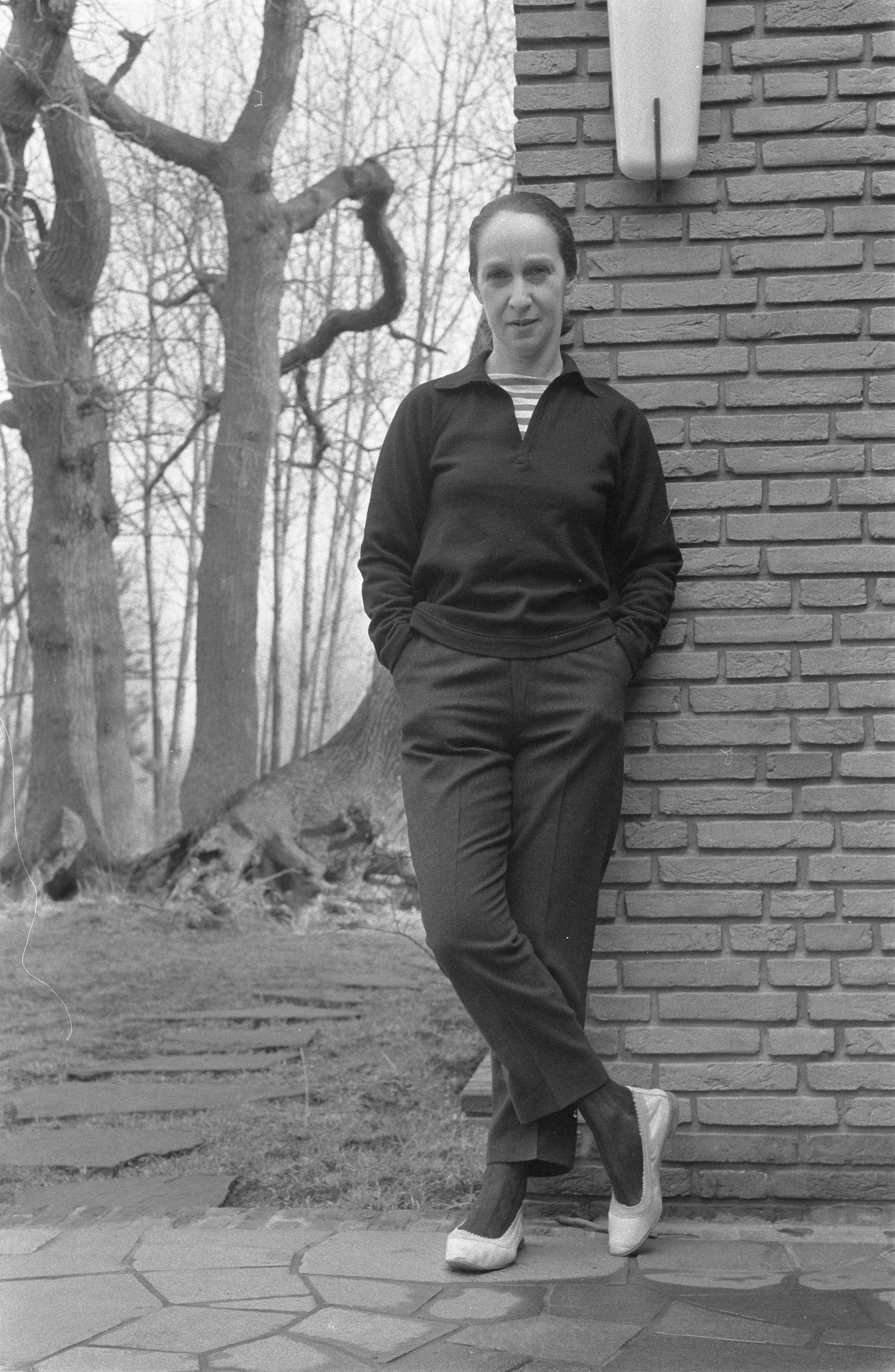 Collectie / Archief : Fotocollectie Anefo Reportage / Serie : [ onbekend ] Beschrijving : Amerikaanse choreografe Anna Sokolow in Den Haag Datum : 24 februari 1960 Locatie : Den Haag, Zuid-Holland Trefwoorden : choreografes Persoonsnaam : Anna Sokolow Fotograaf : Pot, Harry / Anefo Auteursrechthebbende : Nationaal Archief Materiaalsoort : Negatief (zwart/wit) Nummer archiefinventaris : bekijk toegang 2.24.01.05 Bestanddeelnummer : 911-0496